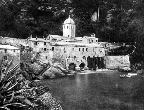 Immagine di fine Ottocento e inizio Novecento dell'abbazia di San Fruttuoso di Capodimonte, Camogli, Liguria, Italia